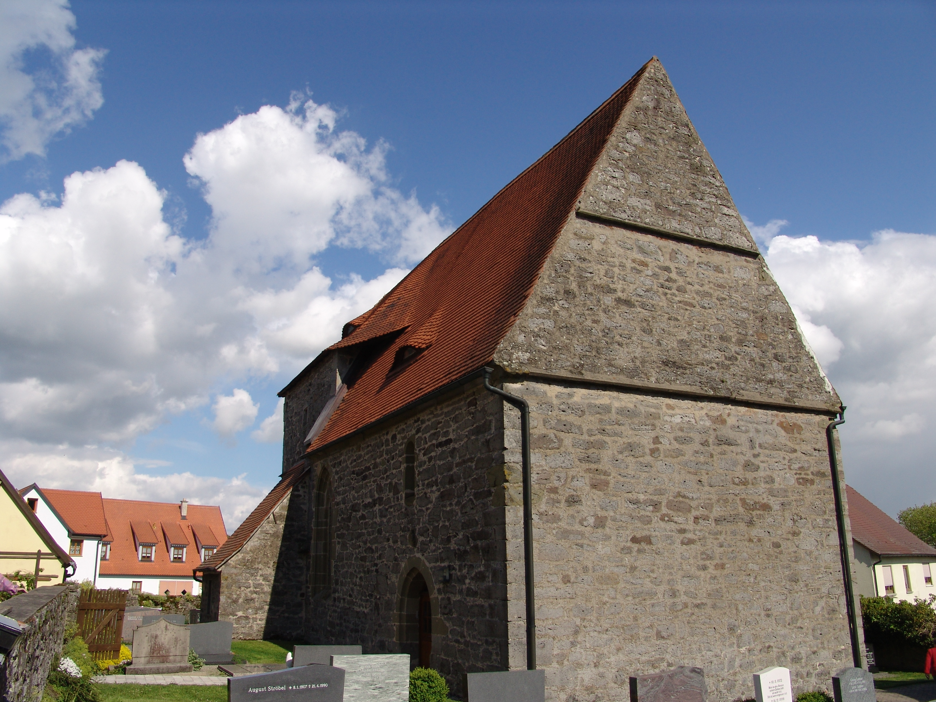 Evangelische Kirche